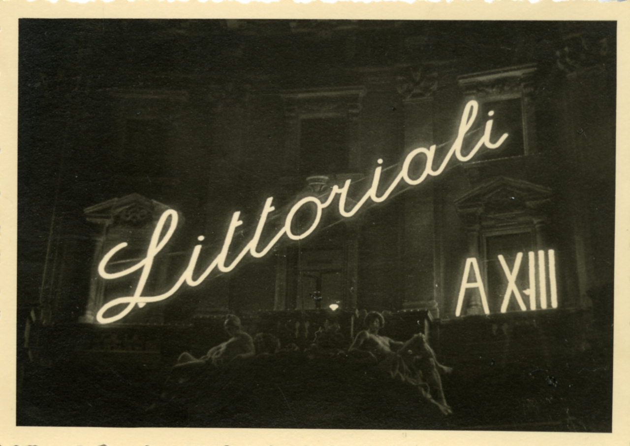 Serie fotografica : Italia, 1940 / Erberto Ruedi, Paolo Monti. - Stampe: 6 : Positivo b/n, gelatina bromuro d'argento/ carta camoscio, 8x11. - ((Al verso delle stampe iscrizioni inventariali e indicazione di responsabilità: "Erberto Ruedi/ Milano". - La suddetta serie è contenuta nella scatola Agfa 13x18, colore arancione